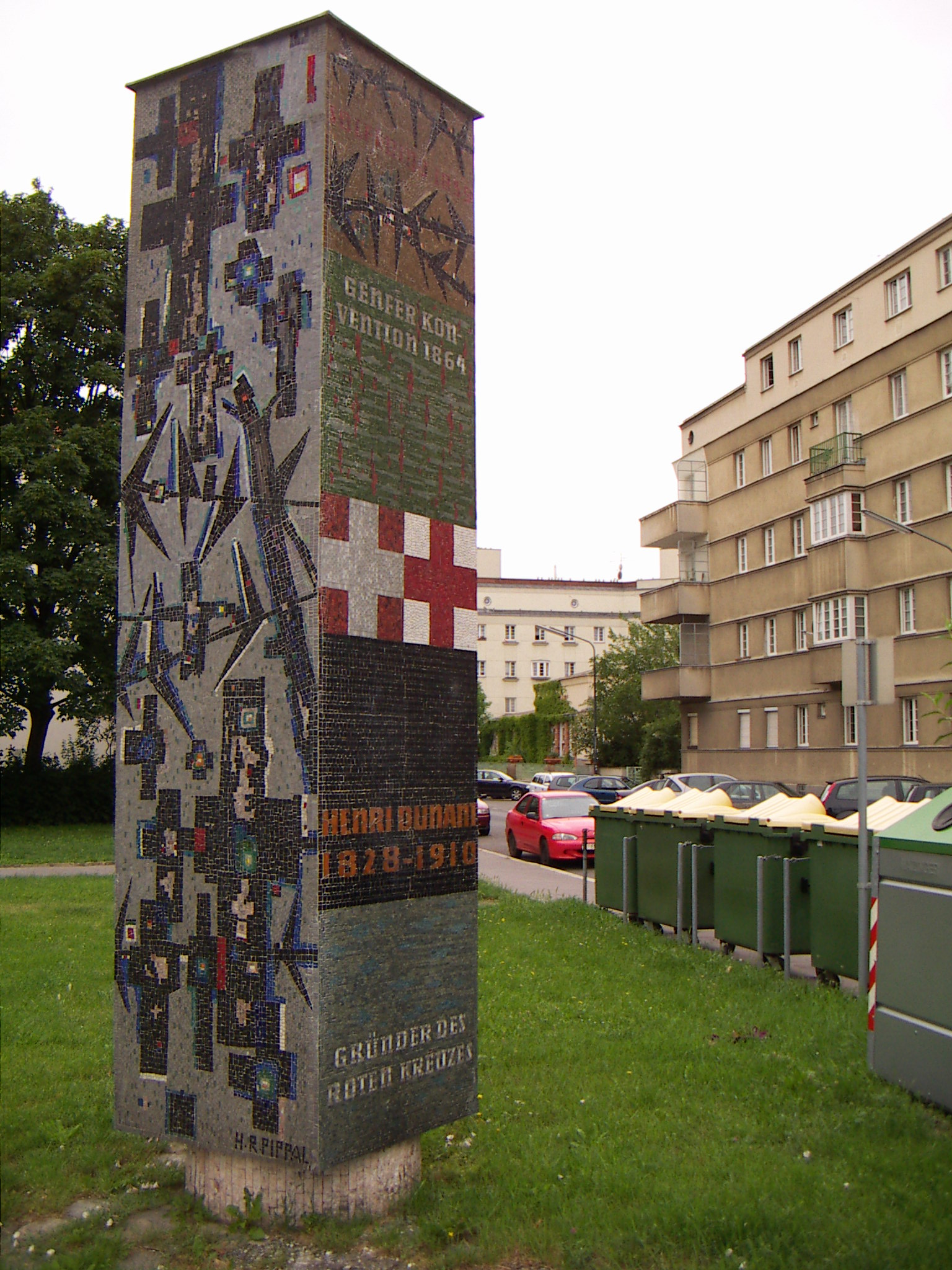 Jean Henri Dunant (1828-1910), Henri Dunant Denkmal in der Dunantgasse, Künstler H. R. Pippal, Floridsdorf, Wien, Wohnhausanlage Karl-Seitz-Hof